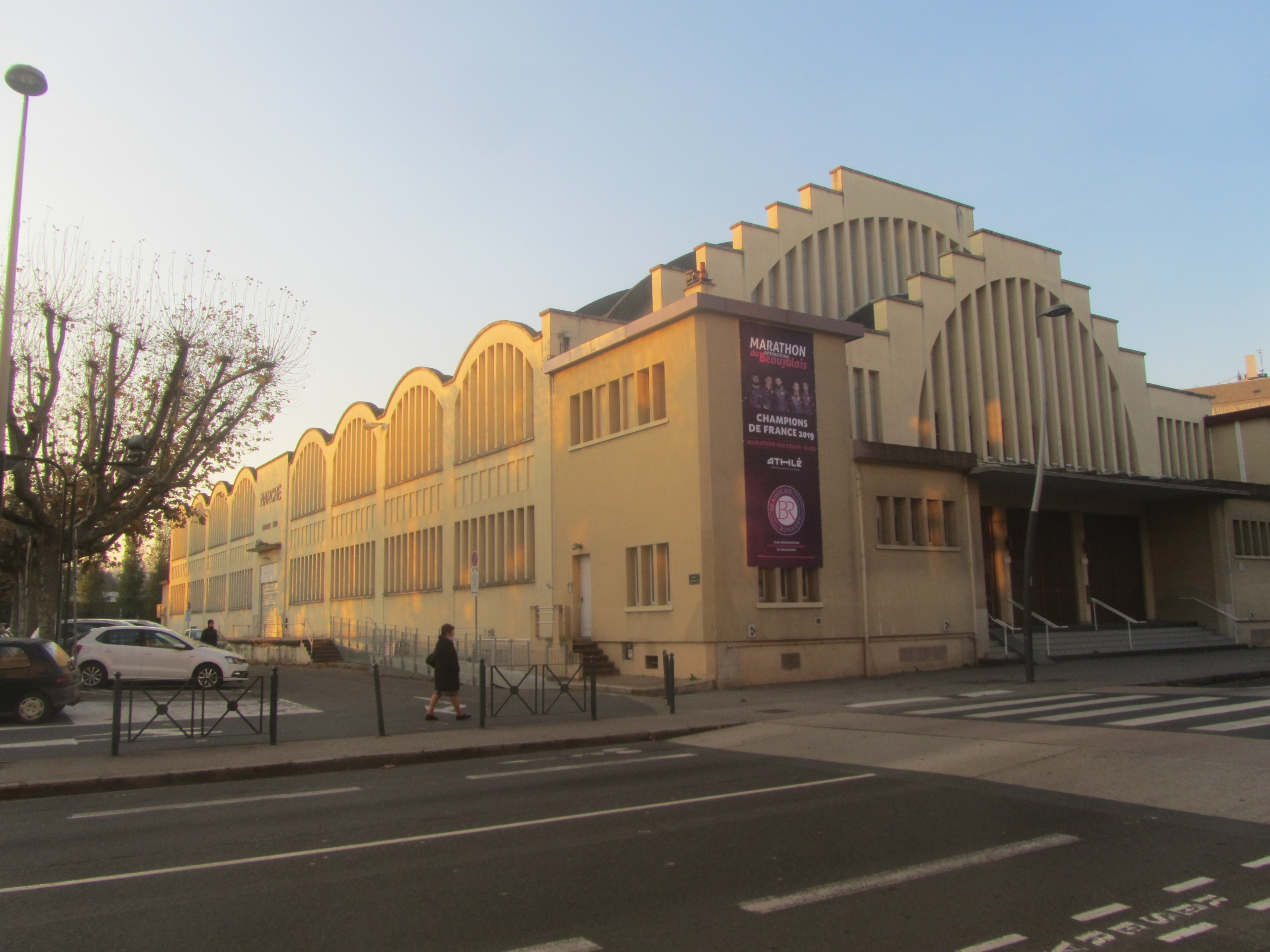 grande halle de villefranche sur saône